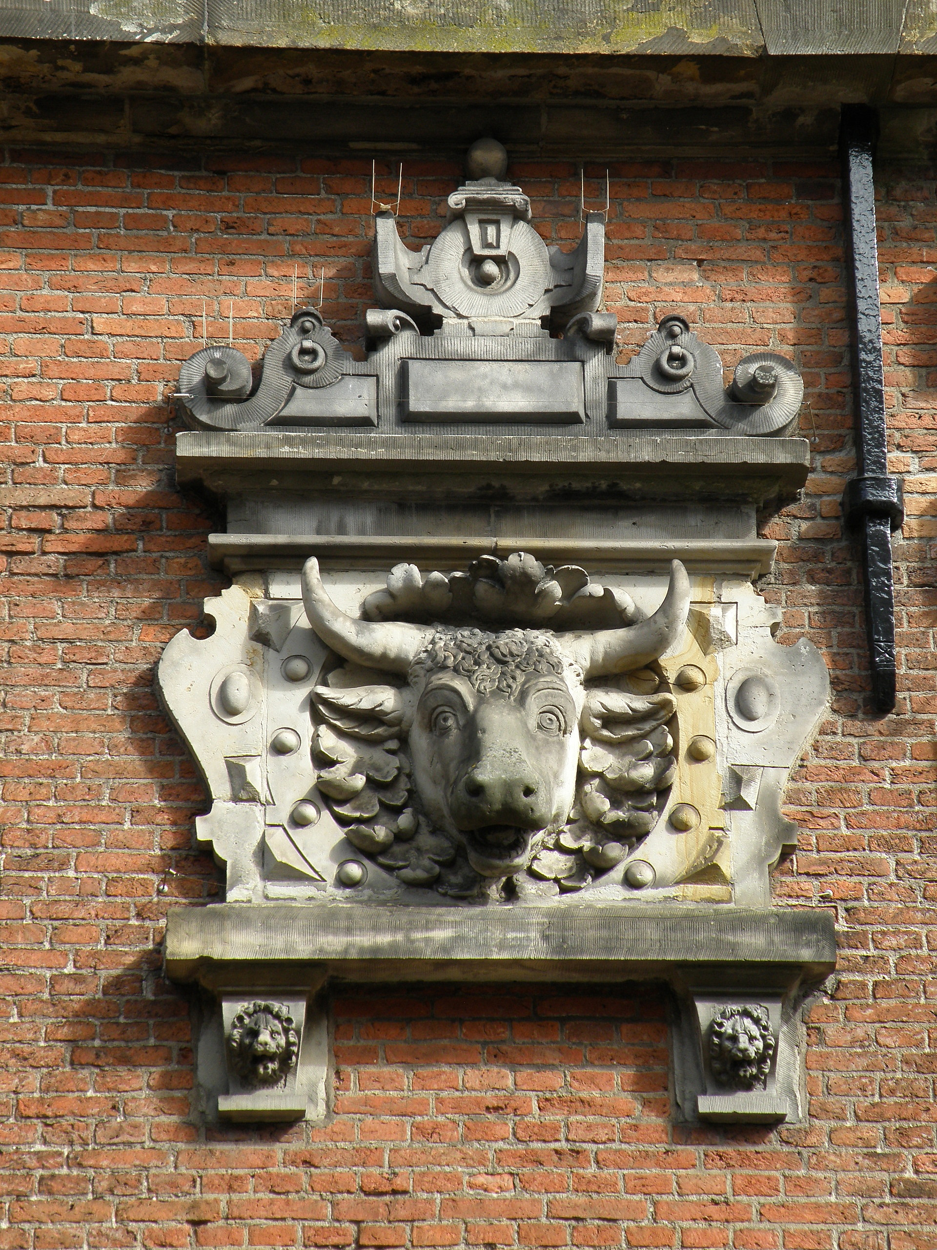 Haarlem, Nederland. Vleeshal, achtergevel.